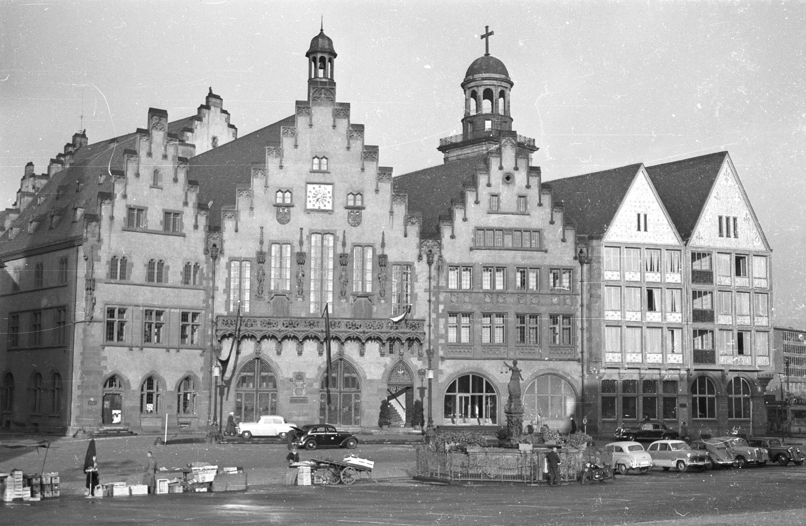 Römer in Frankfurt in den 1950er-Jahren